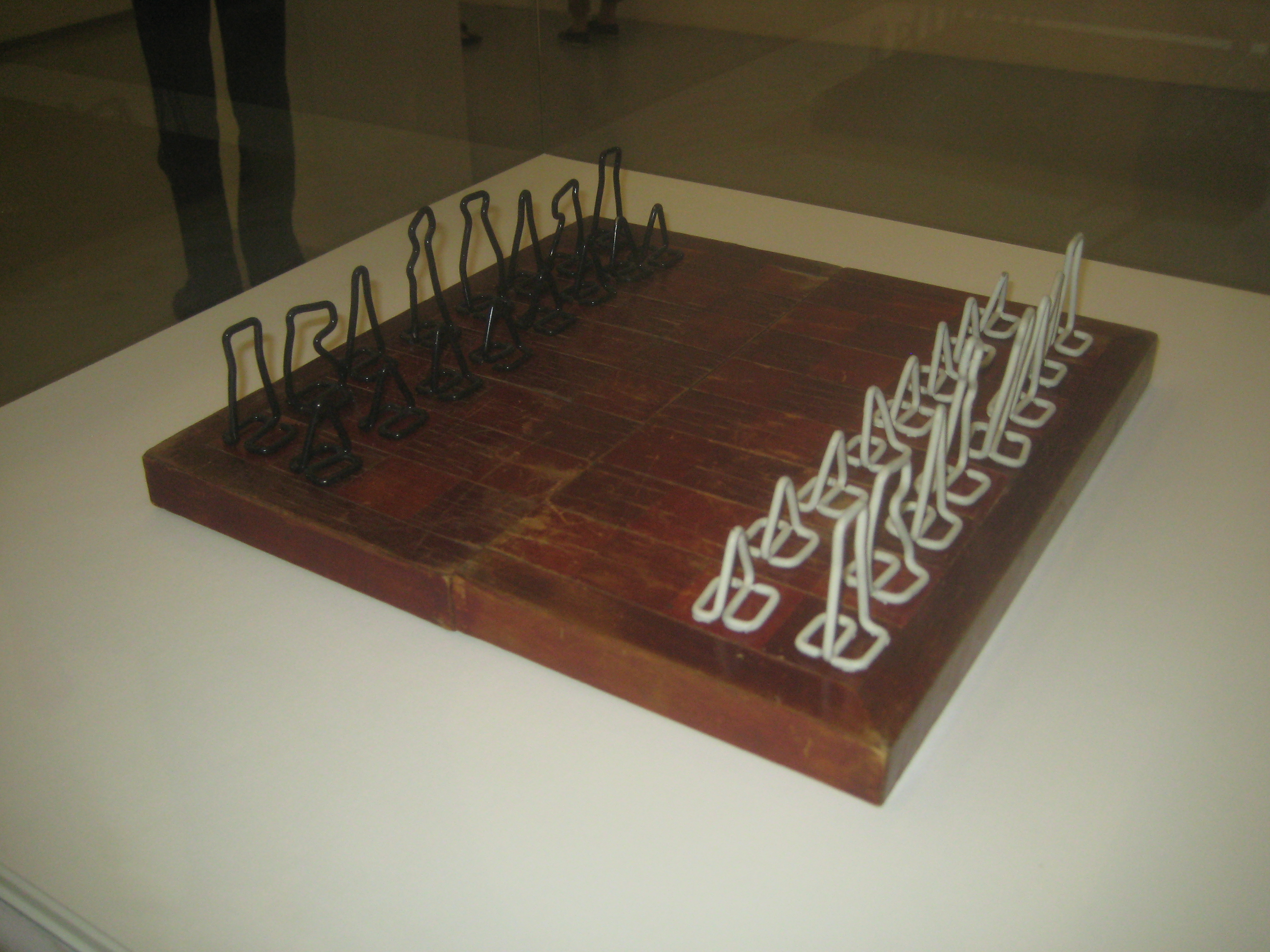 Шахматы из ГУЛАГа